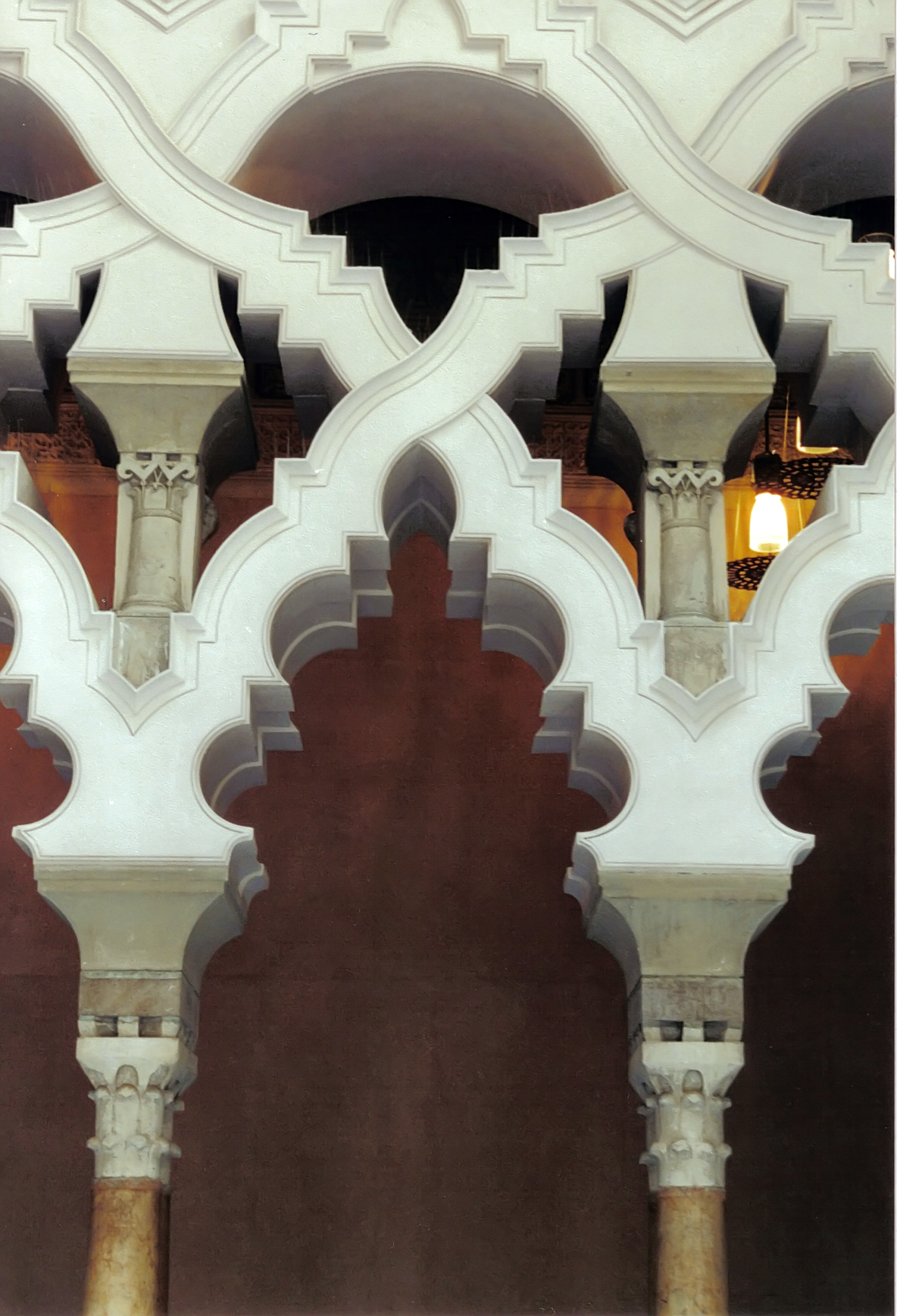 Aljaferia de Saragosse - Arc outrepassé brisé d'une des portes d'accès au Salon Doré